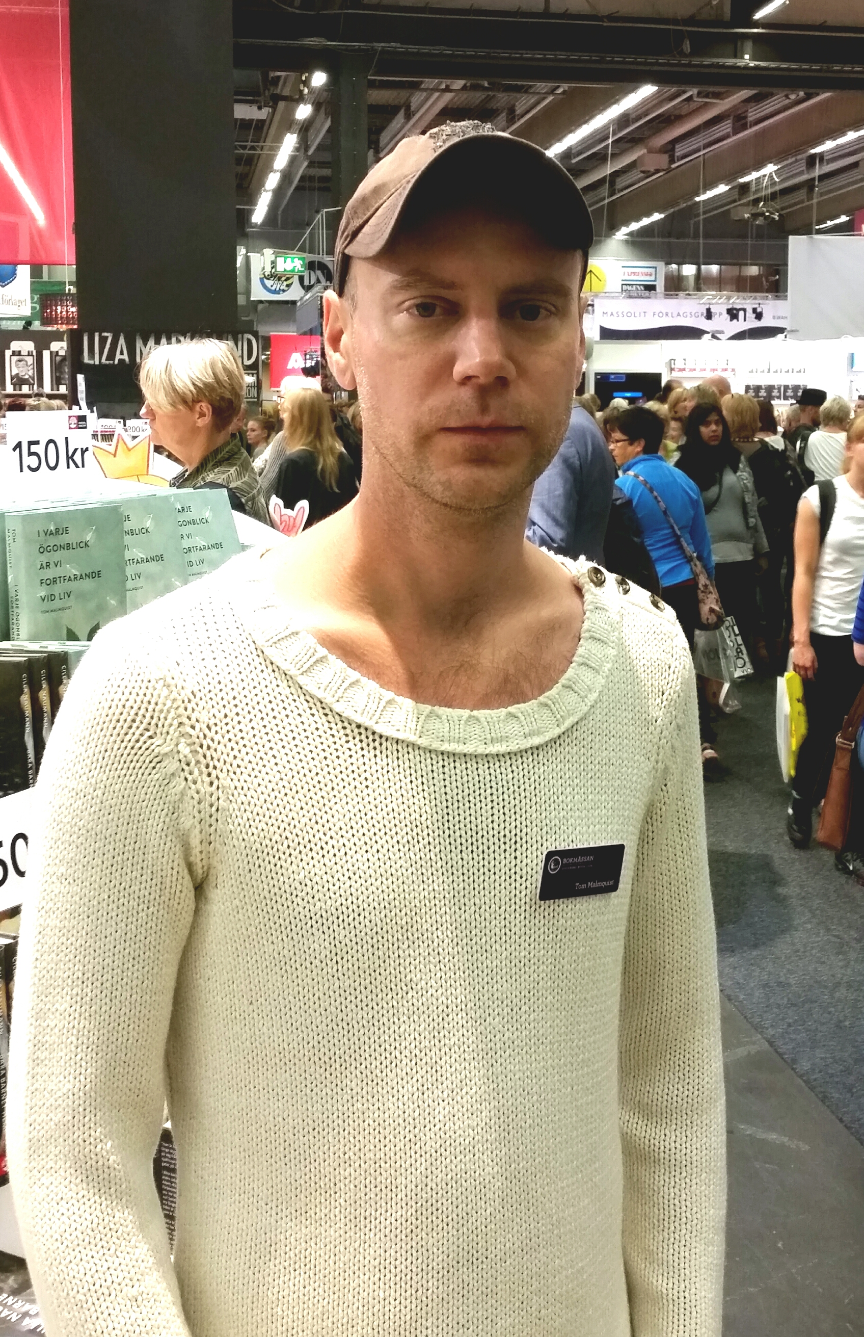 Författaren Tom Malmquist på Bok & Bibliotek-mässan i Göteborg 2015.